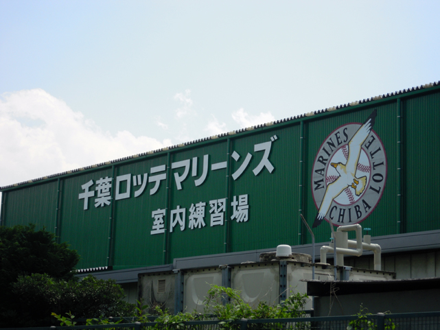 埼玉県 千葉ロッテマリーンズ練習場(ロッテ浦和球場)横の室内練習場外観。